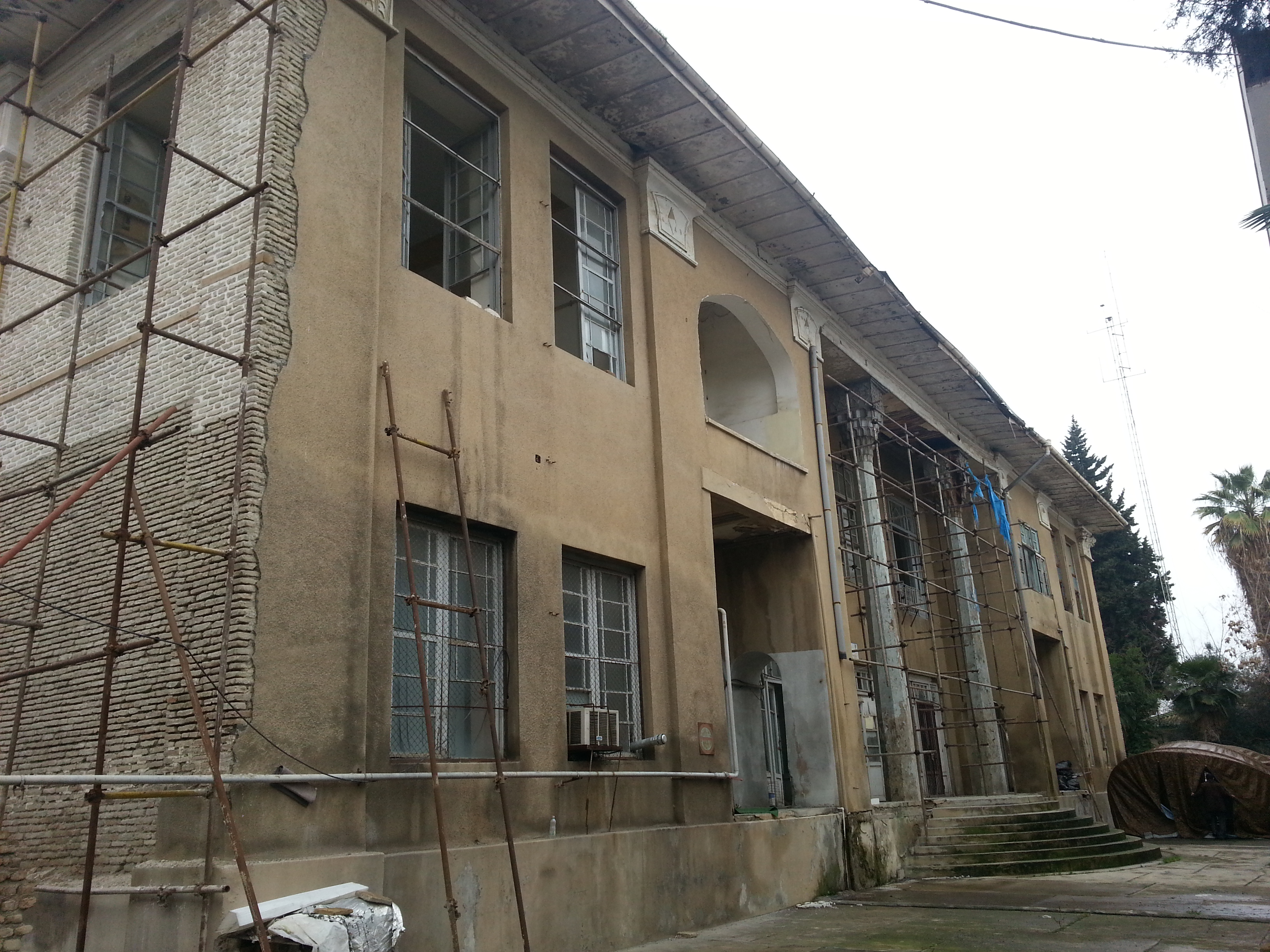 کاخ آقا محمدخان قاجار